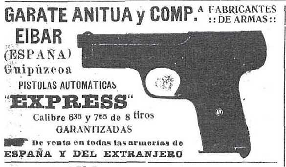 Garate Anitua y C. Eibar (España) Guipuzcoa pistolas automatica express calibre 6,35 y 7,65 de 8 tiros- inserzione pubblicitaria del 23.2.1991 su Nuevo Mundo di Madrid